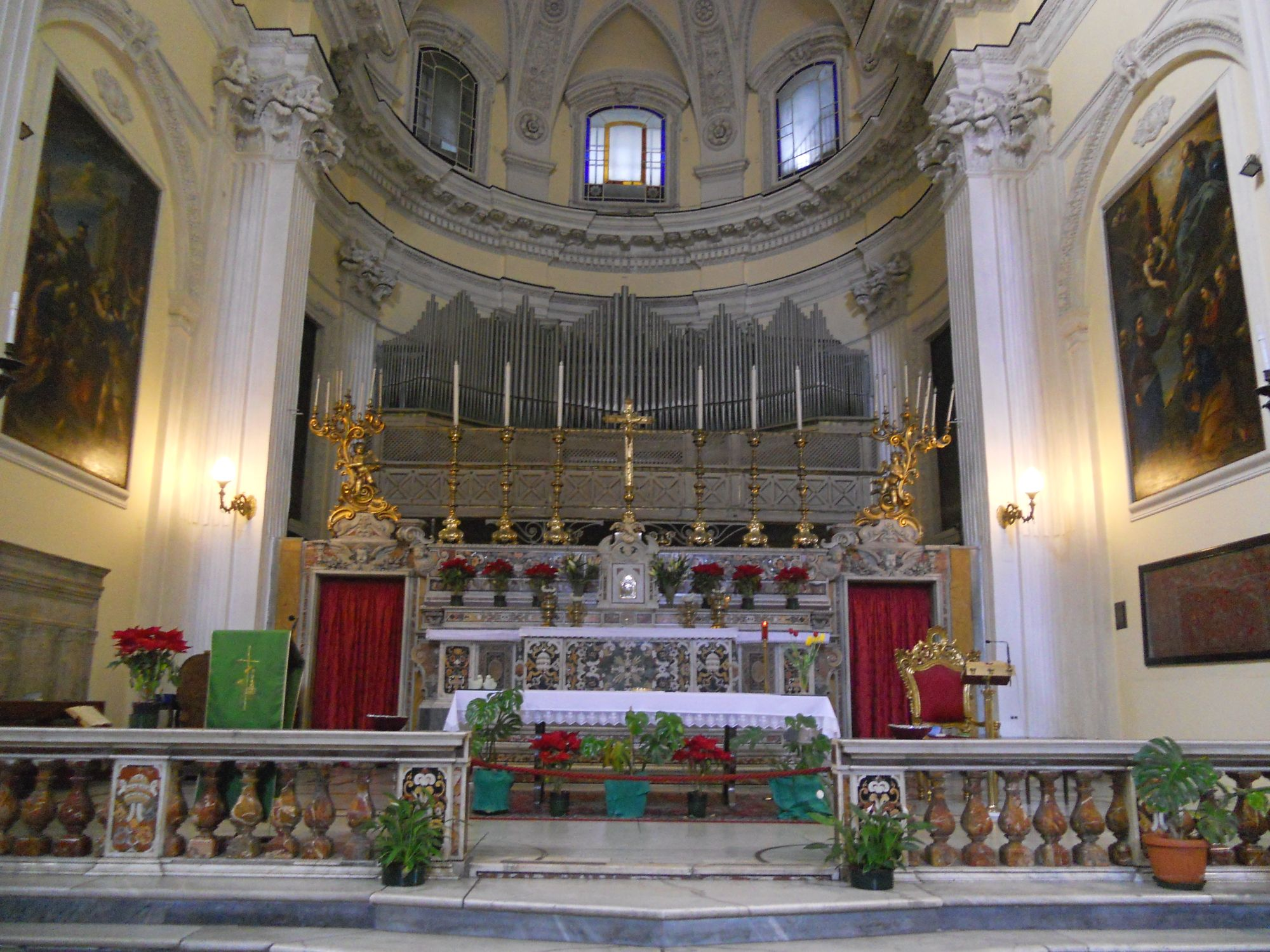 Altare San Pietro ad Aram